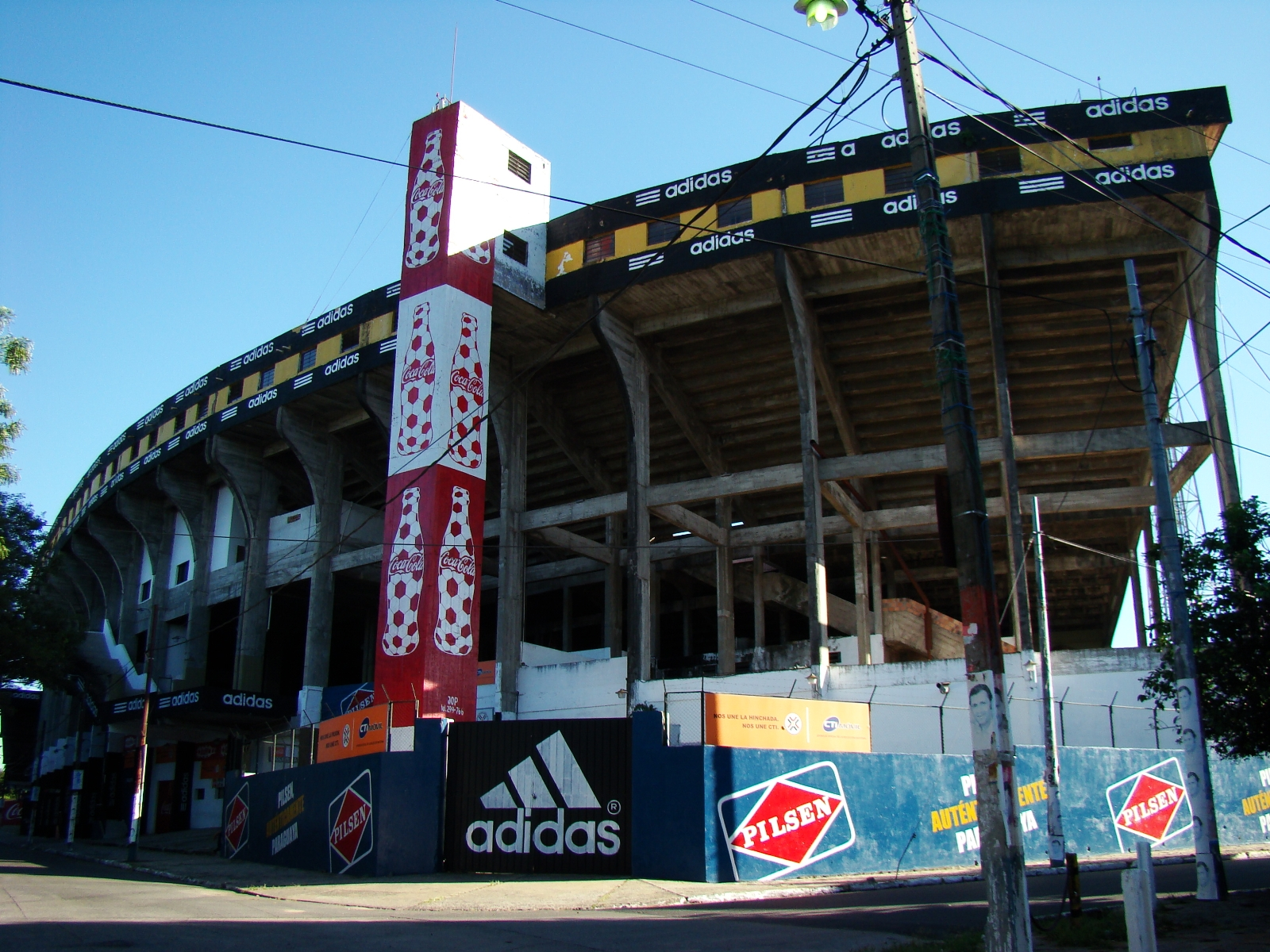 Fachada del estadio.